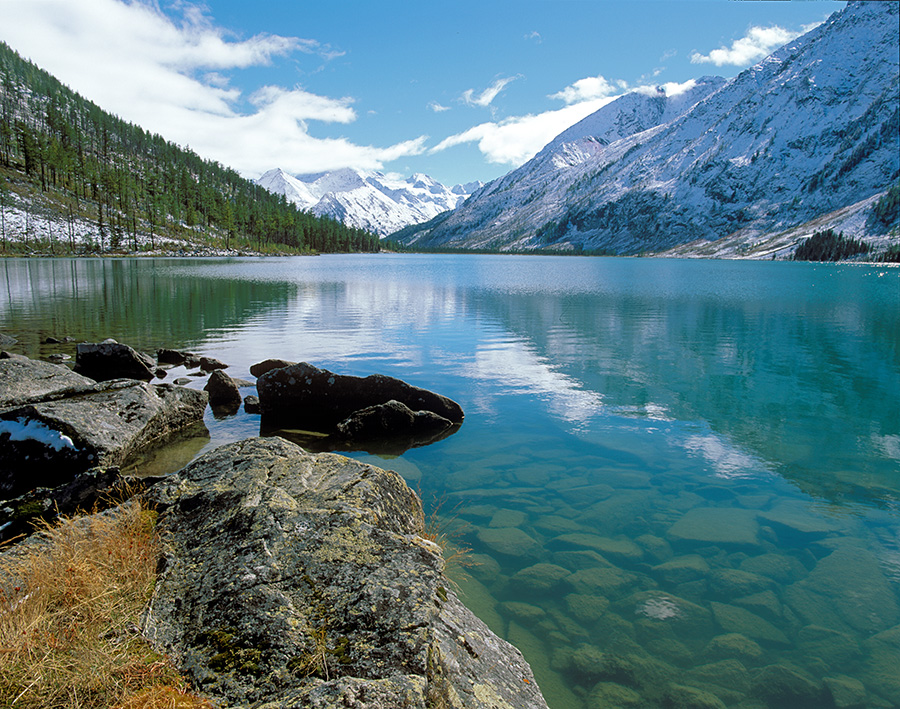 Катунский заповедник на Алтае